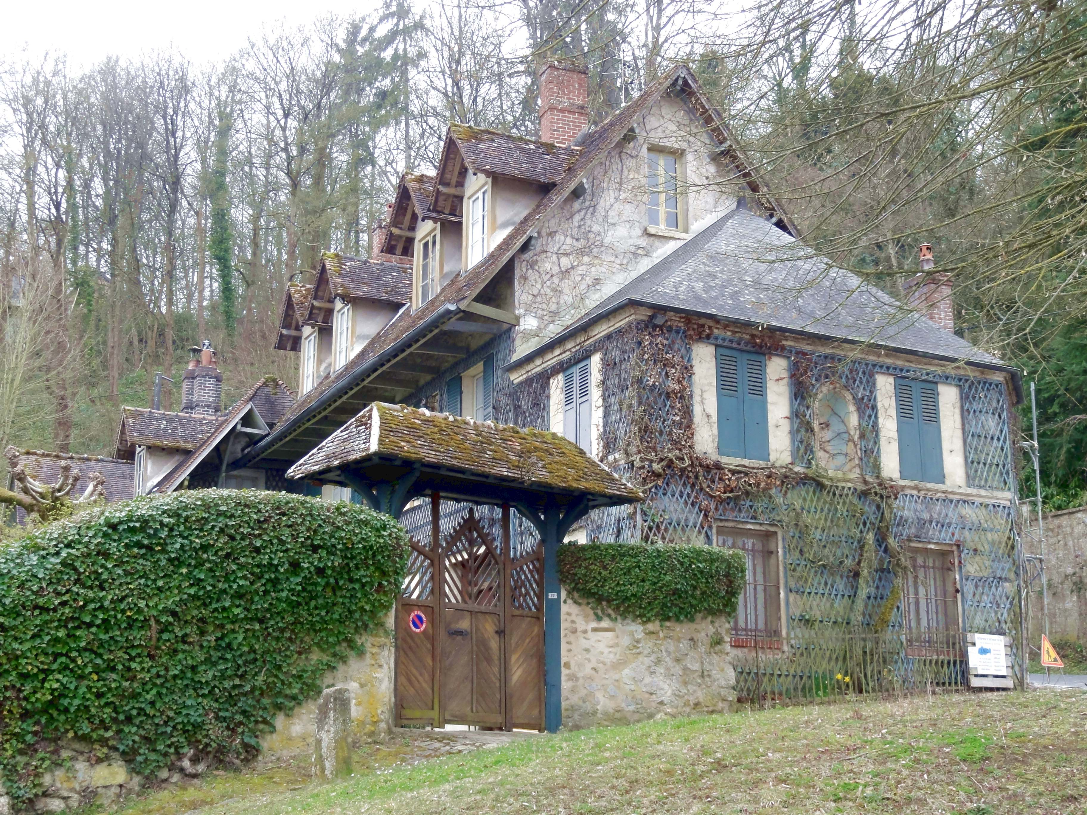 Maison de Félix Martin-Sabon, face à l'église.